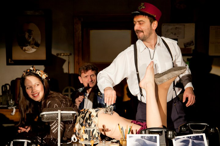 Snímek z inscenace "Ostře sledované vlaky" Bohumila Hrabala. Na snímku Tereza Rumlová, Miroslav Babuský a Petr Halíček.